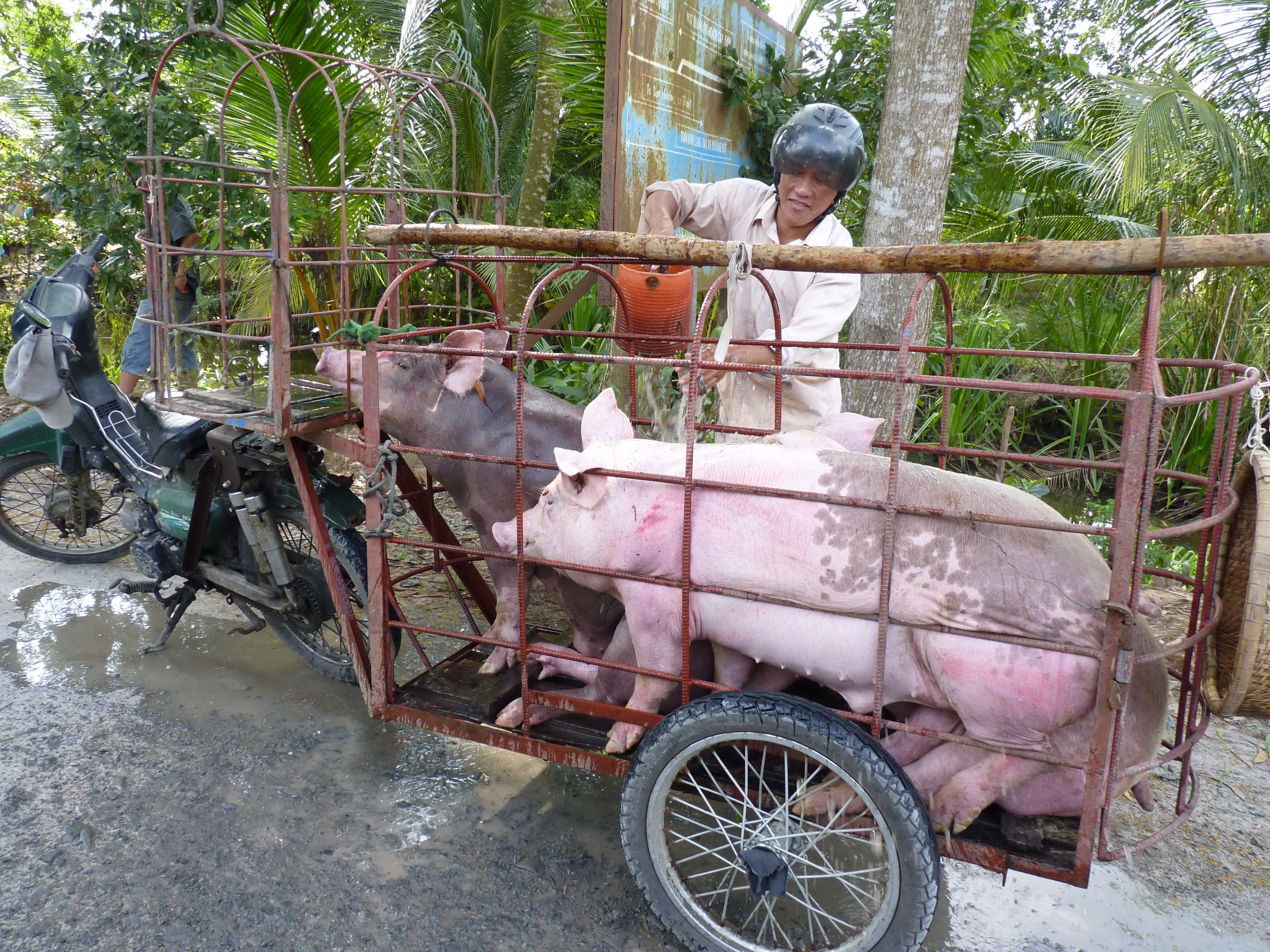 Bình Phú, Cai Lậy, Tiền Giang, Vietnam